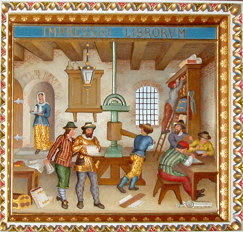 Bogtrykkerværksted. Fra loftet af riddersalen på Frederiksborg Slot, Hillerød Denmark. Loftet er en rekonstuktion af det oprindelige fra Christian 4's tid udført 1874-1880 efter ødelæggelser ved en brand 1859.